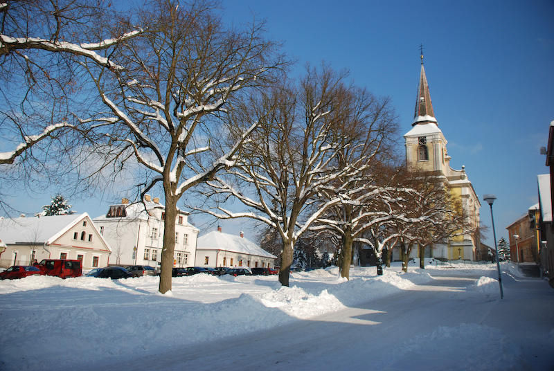 Trhová Kamenice v zimě